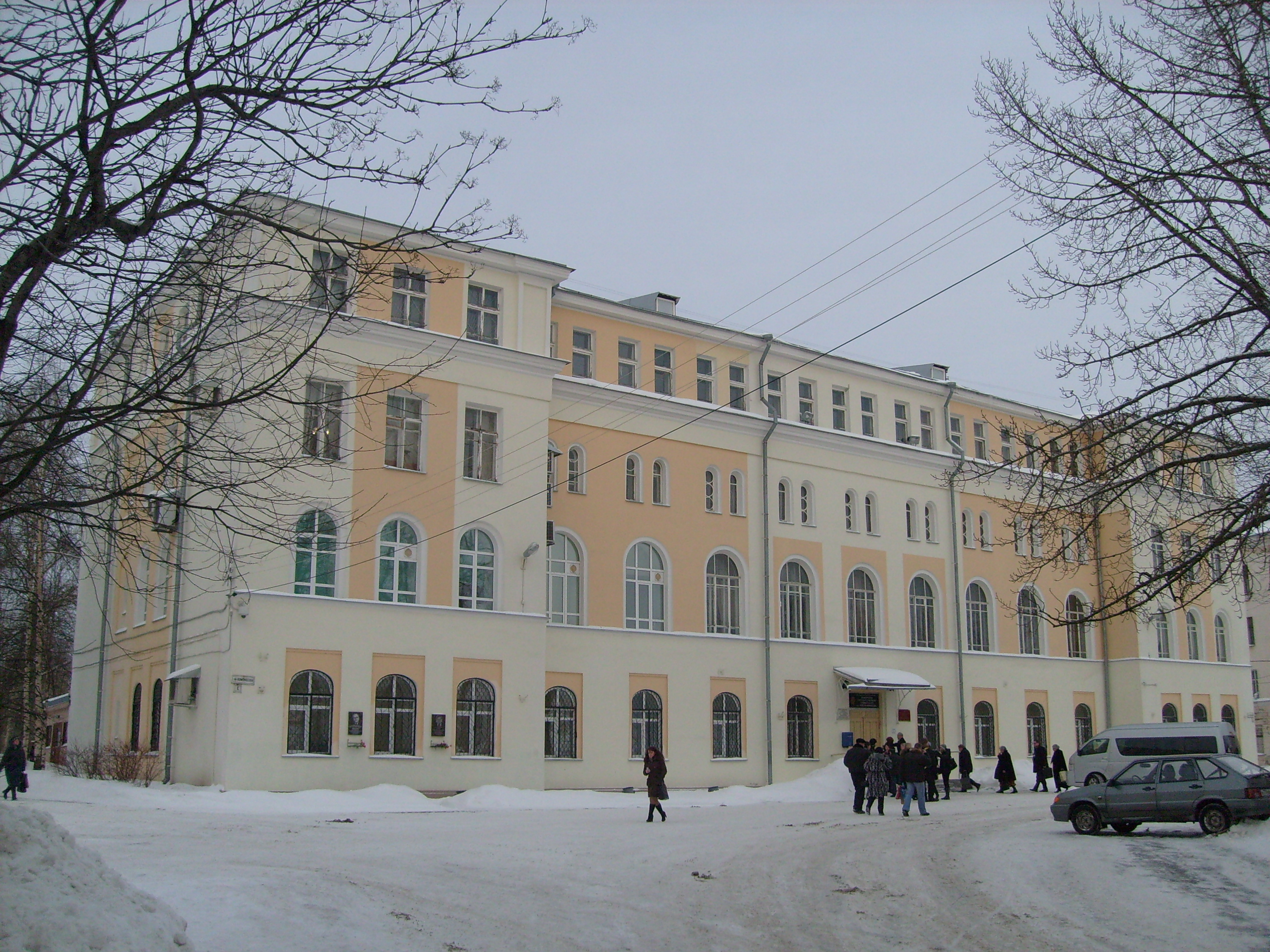 Архангельск, пр. Ломоносова, 4. Духовная семинария, 1908—1910, Архитектор В. Андросов. Ныне - главный корпус Поморского государственного университета.